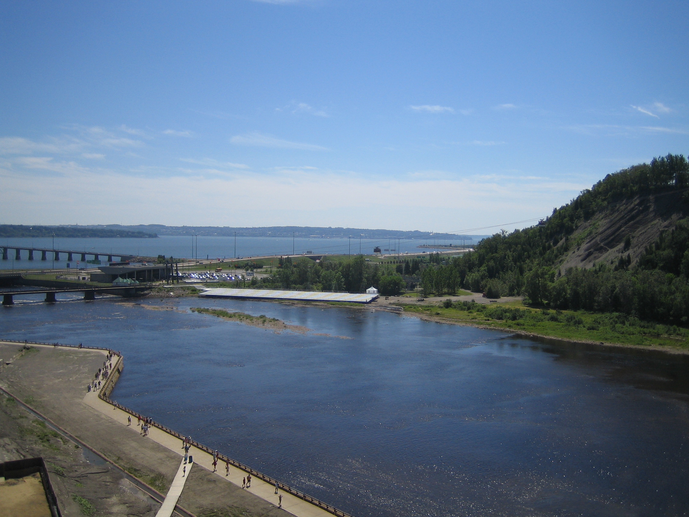 Parc de la Chute-Montmorency, Québec, Canada